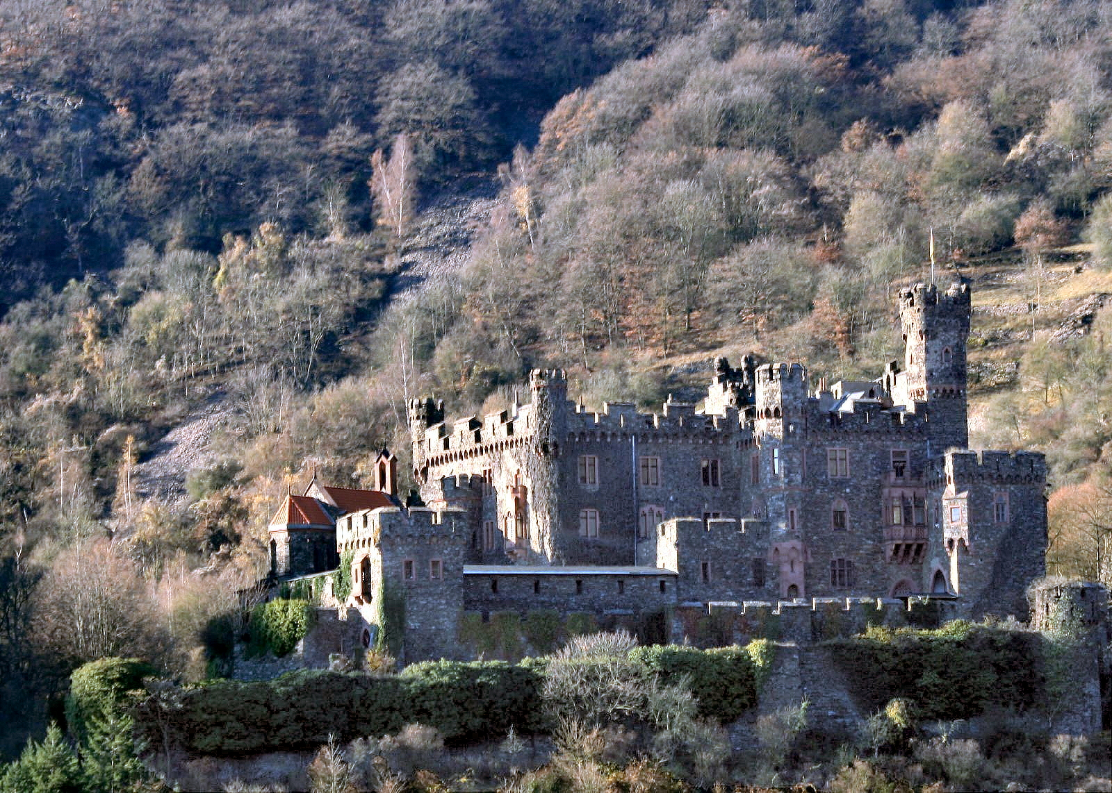 Burg Reichenstein (Rhein)